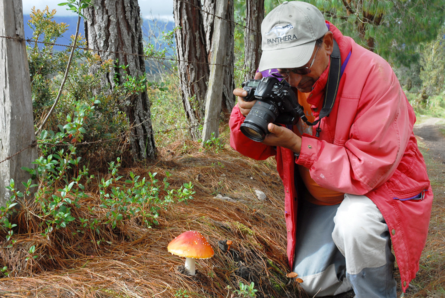 Andrés Hurtado García